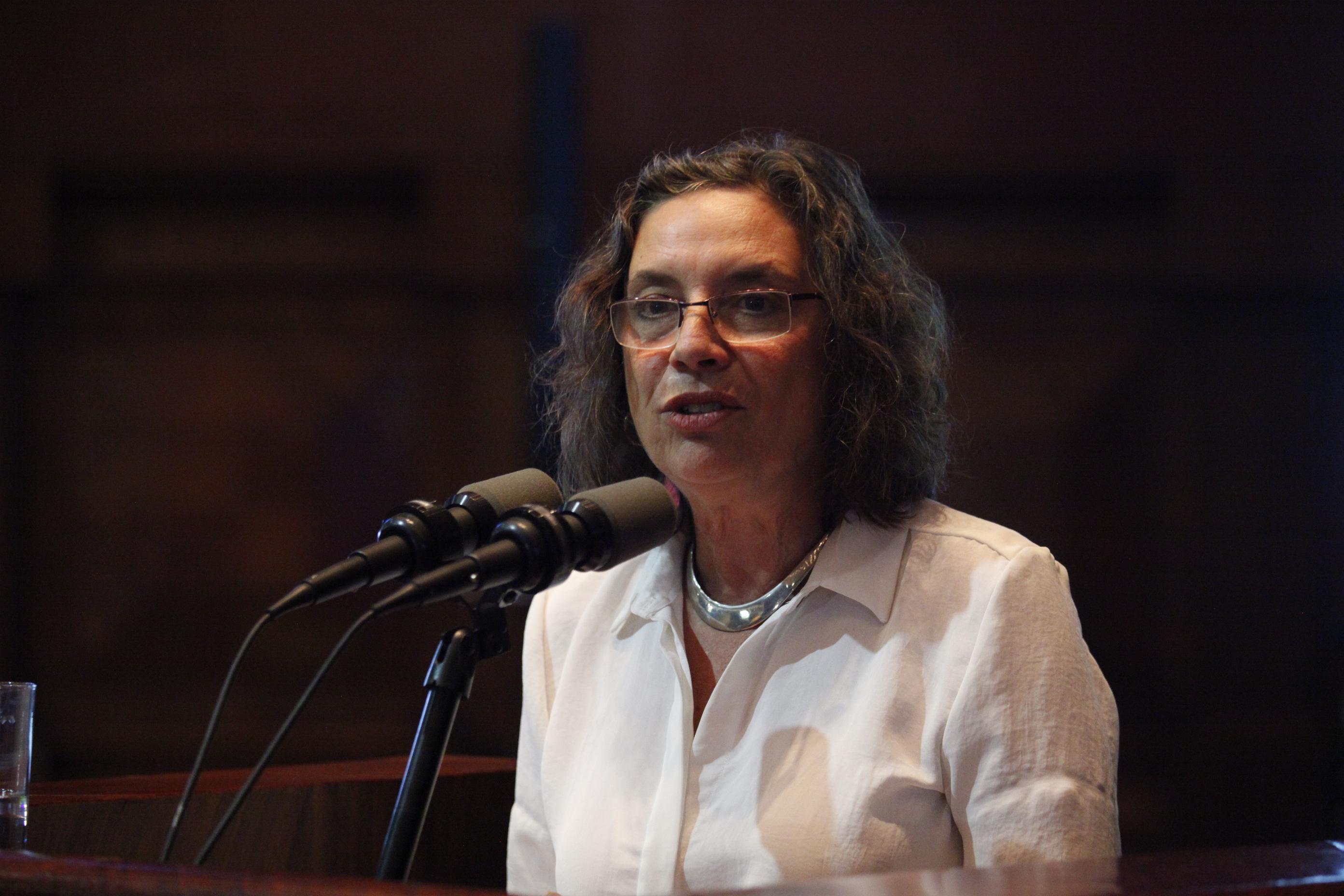 17 de septiembre de 2015.- II Foro Parlamentario Beijing + 20 Tema: Conferencia Magistral - Mujeres y economía desde la sostenibilidad de la vida Lugar: Salón Nela Martínez. Palacio Legislativo Fotografía: Hugo Ortiz / Asamblea Nacional